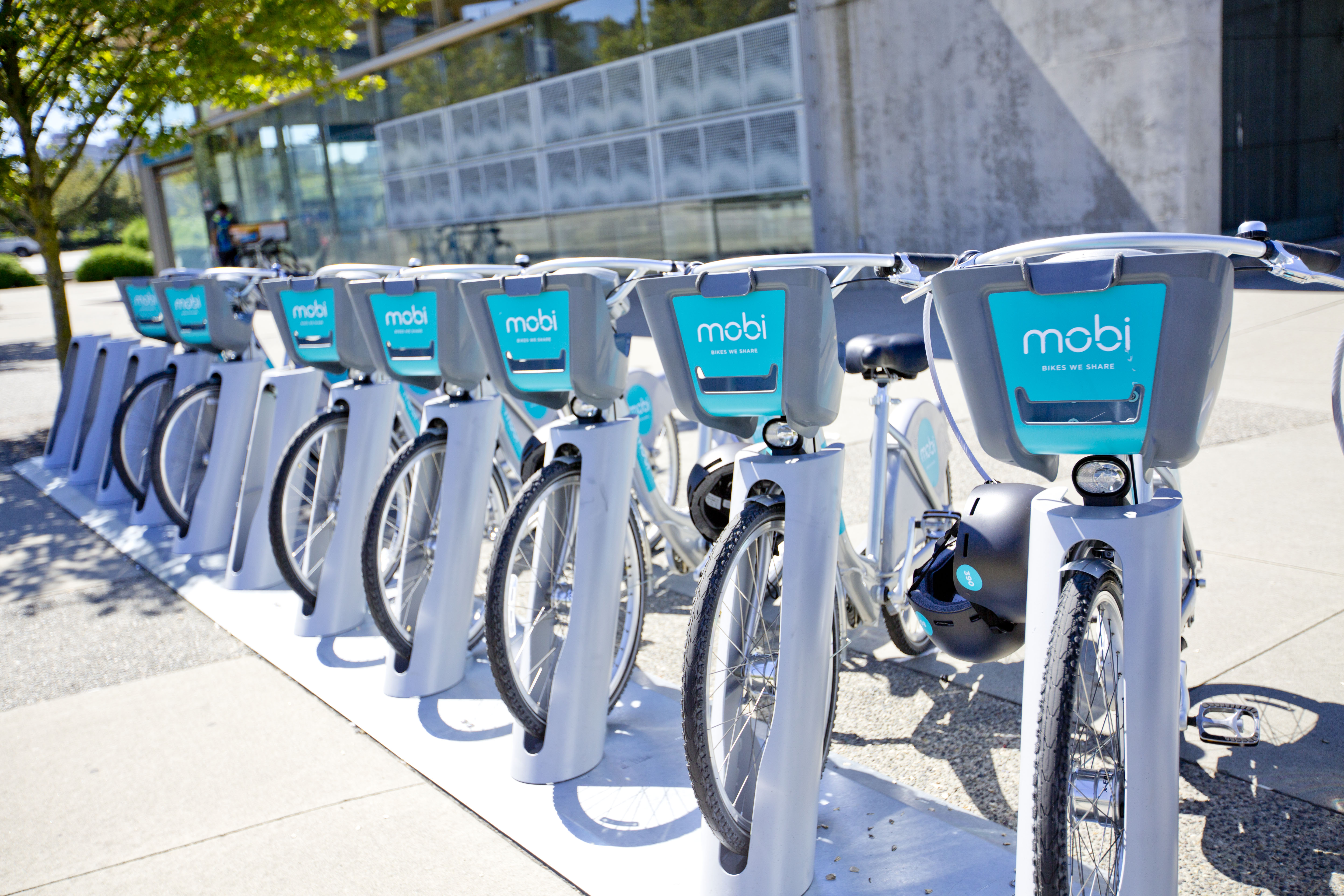 Mobi Bike Sharing